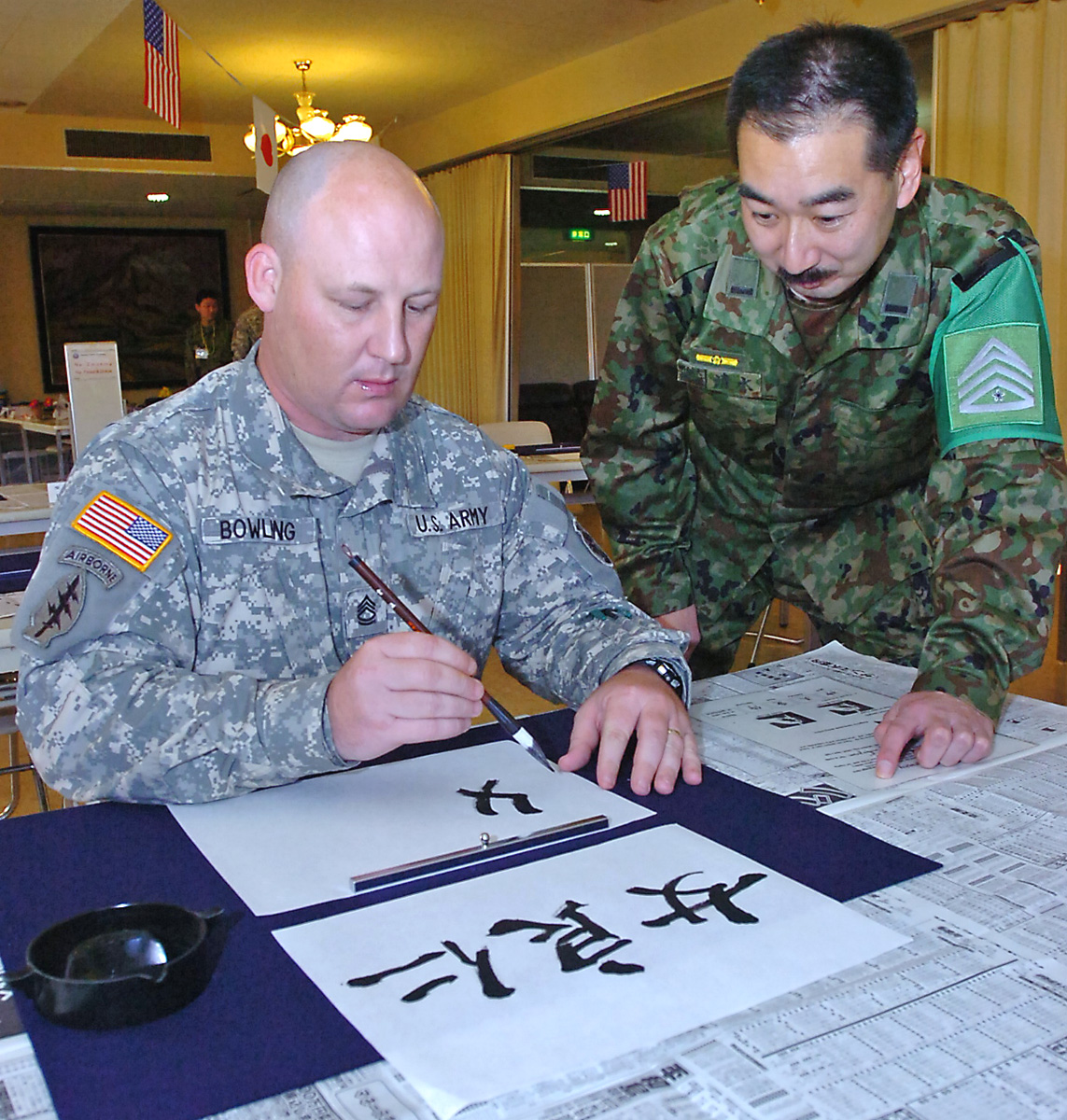 陸上自衛隊の中隊先任上級曹長腕章を装着した准陸尉（2008年12月、日米共同方面隊指揮所演習（ＹＳ：山桜-５５）にて）